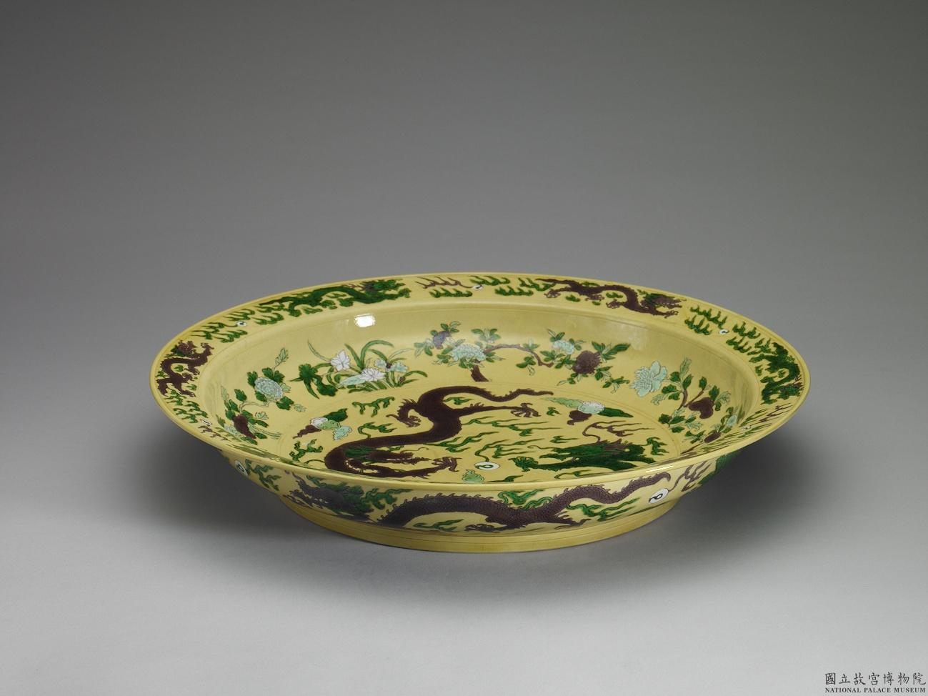 素三彩黃地褐綠雙龍紋盤側面